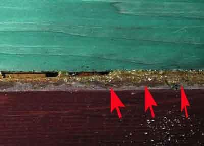 propolis